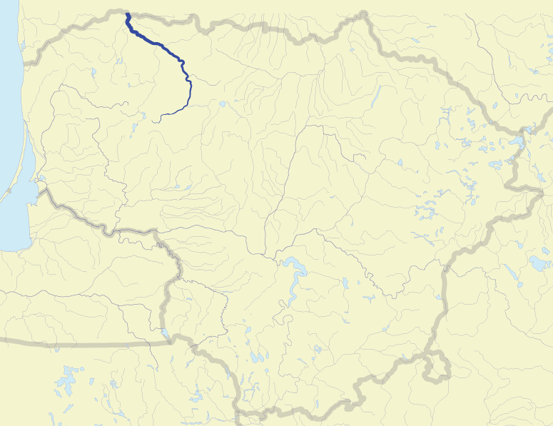 River Venta